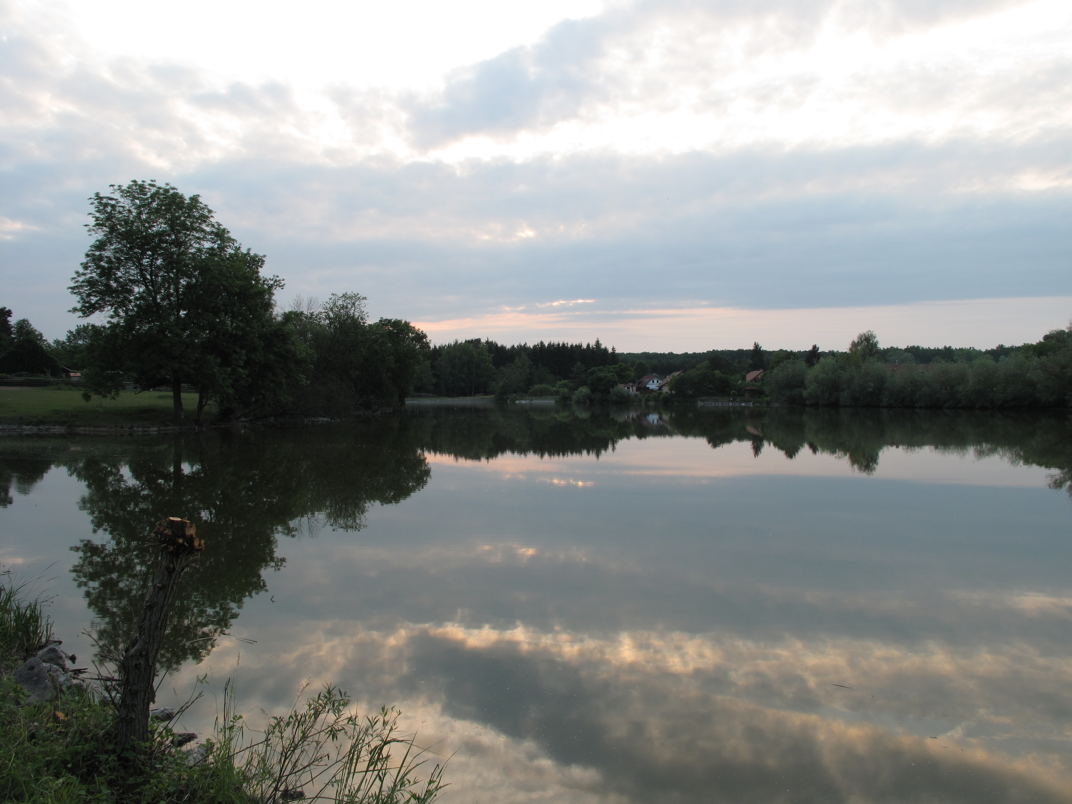 Hladina Komorního rybníka. Okres Nymburk, Česká republika.